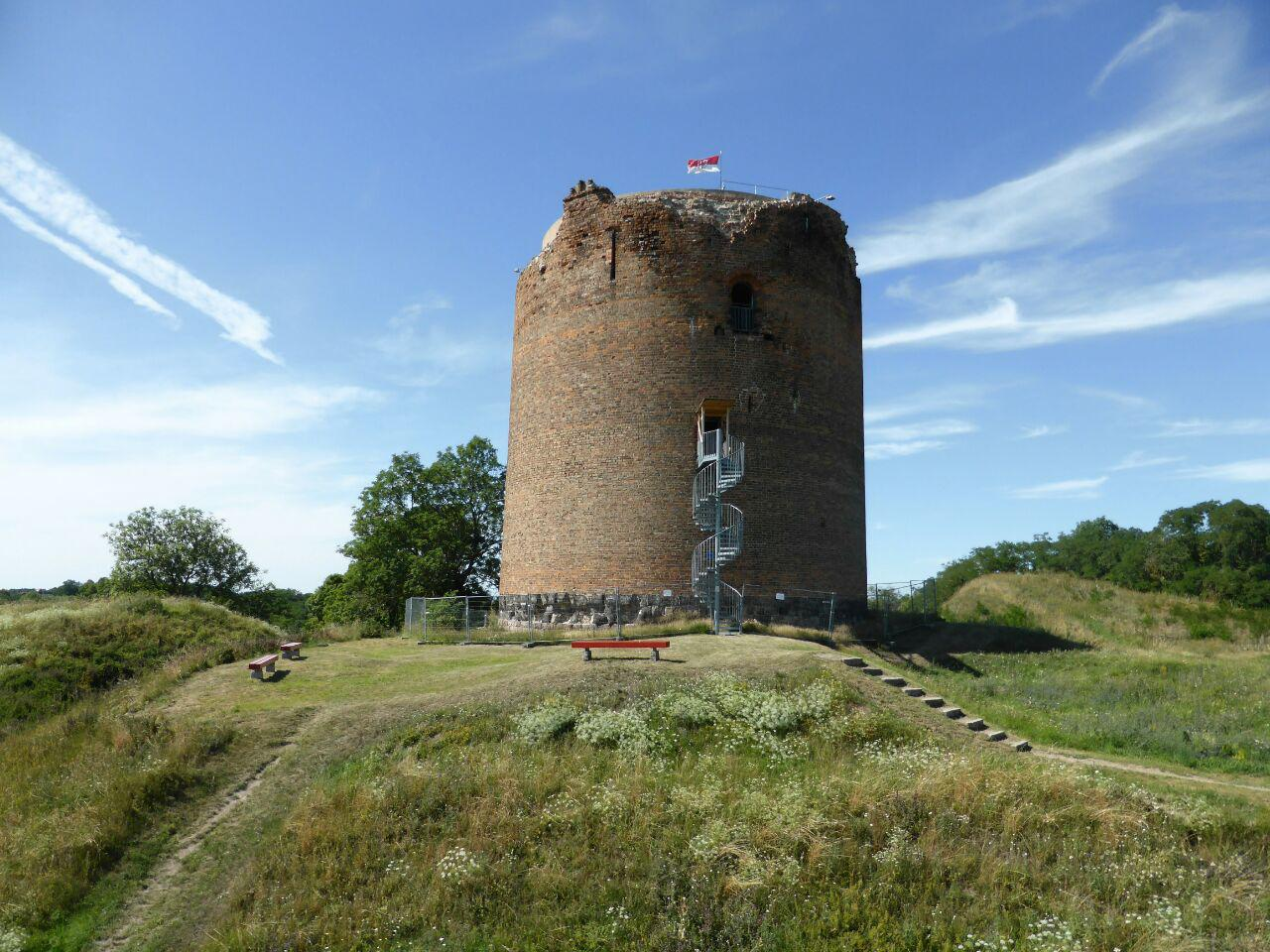 landessprachlich Grützpott genannt